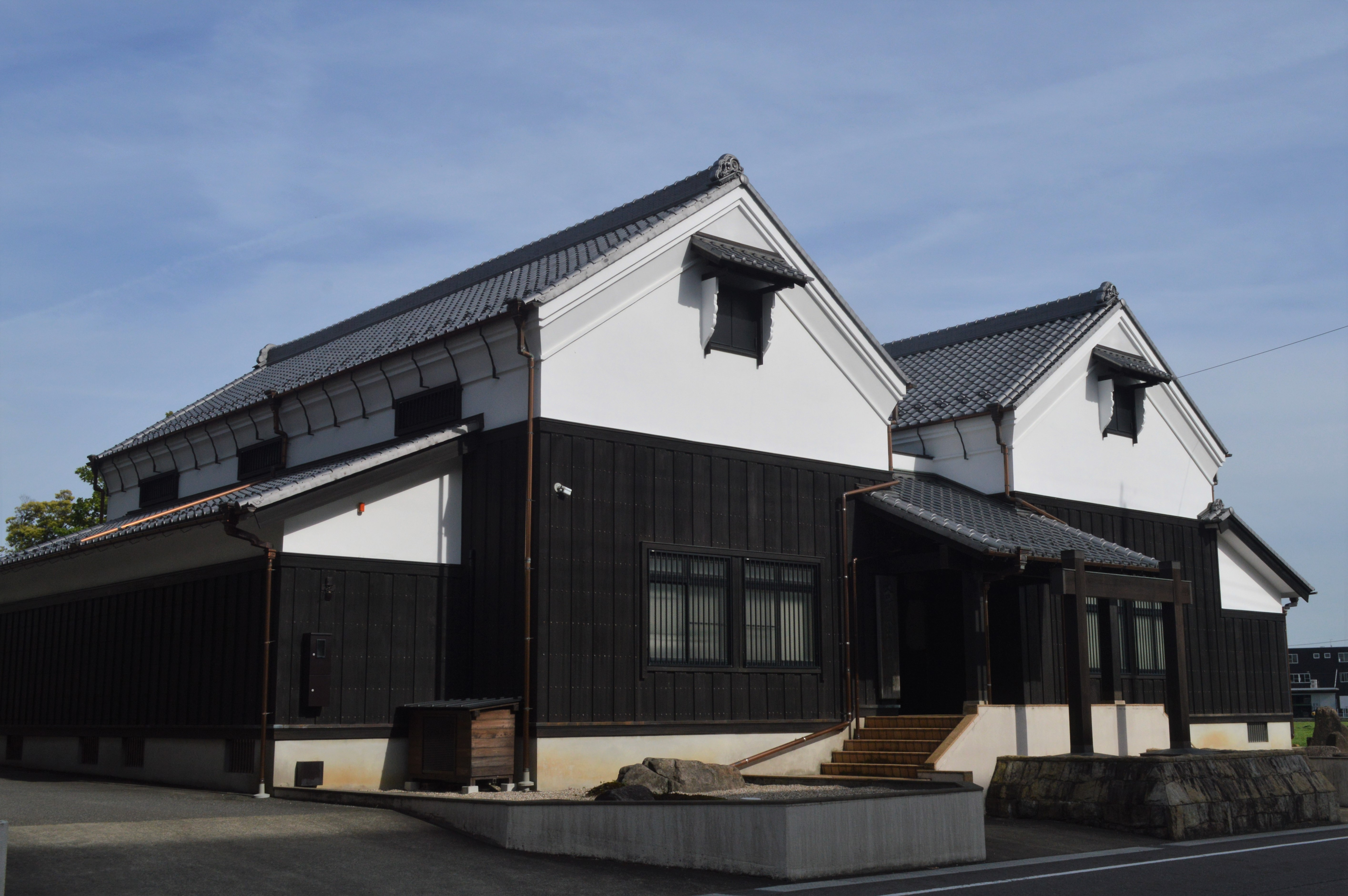 愛知県丹羽郡大口町にある大口町文化財収蔵庫。